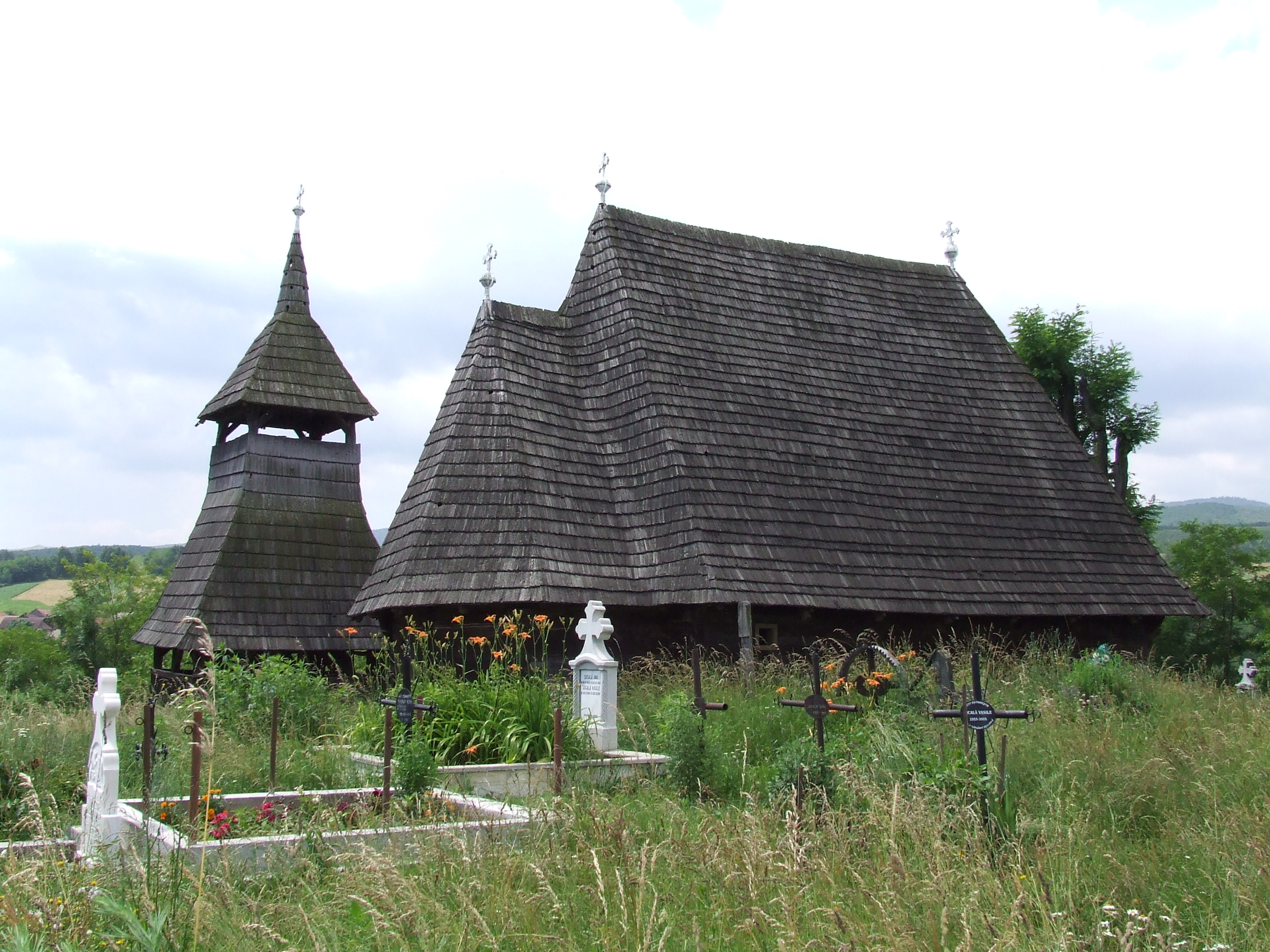 Biserica de lemn din Finişel. Vedere din nord-est.